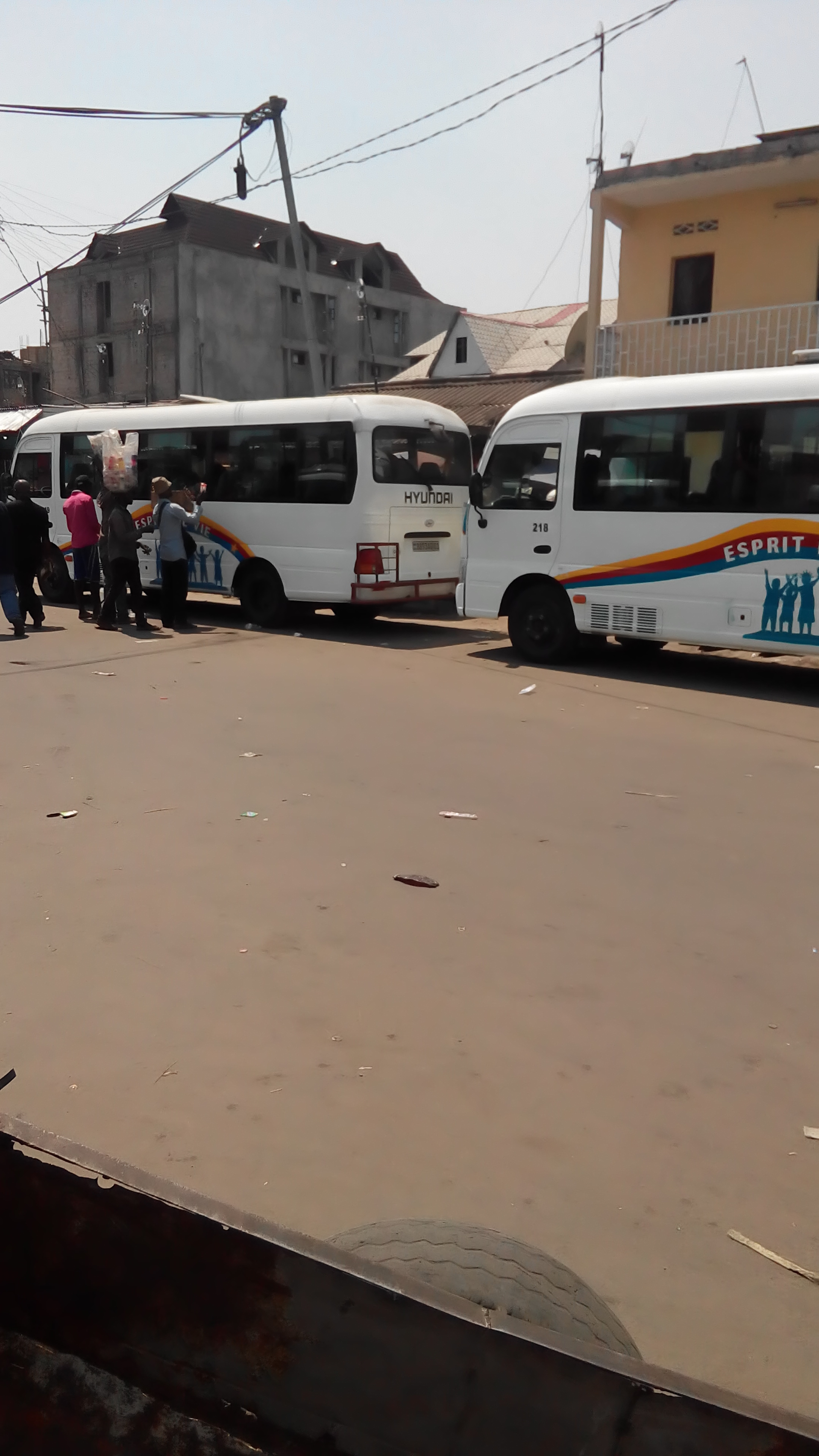 Bus Esprit de Vie à l’Arrêt Victoire, commune de Kalamu. Les Nouveaux bus surnommés Esprit de Vie pour éradiquer les Esprits de mort, Véhicule de marque Mercedes 207